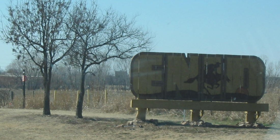 Sign outside Enid, Oklahoma.